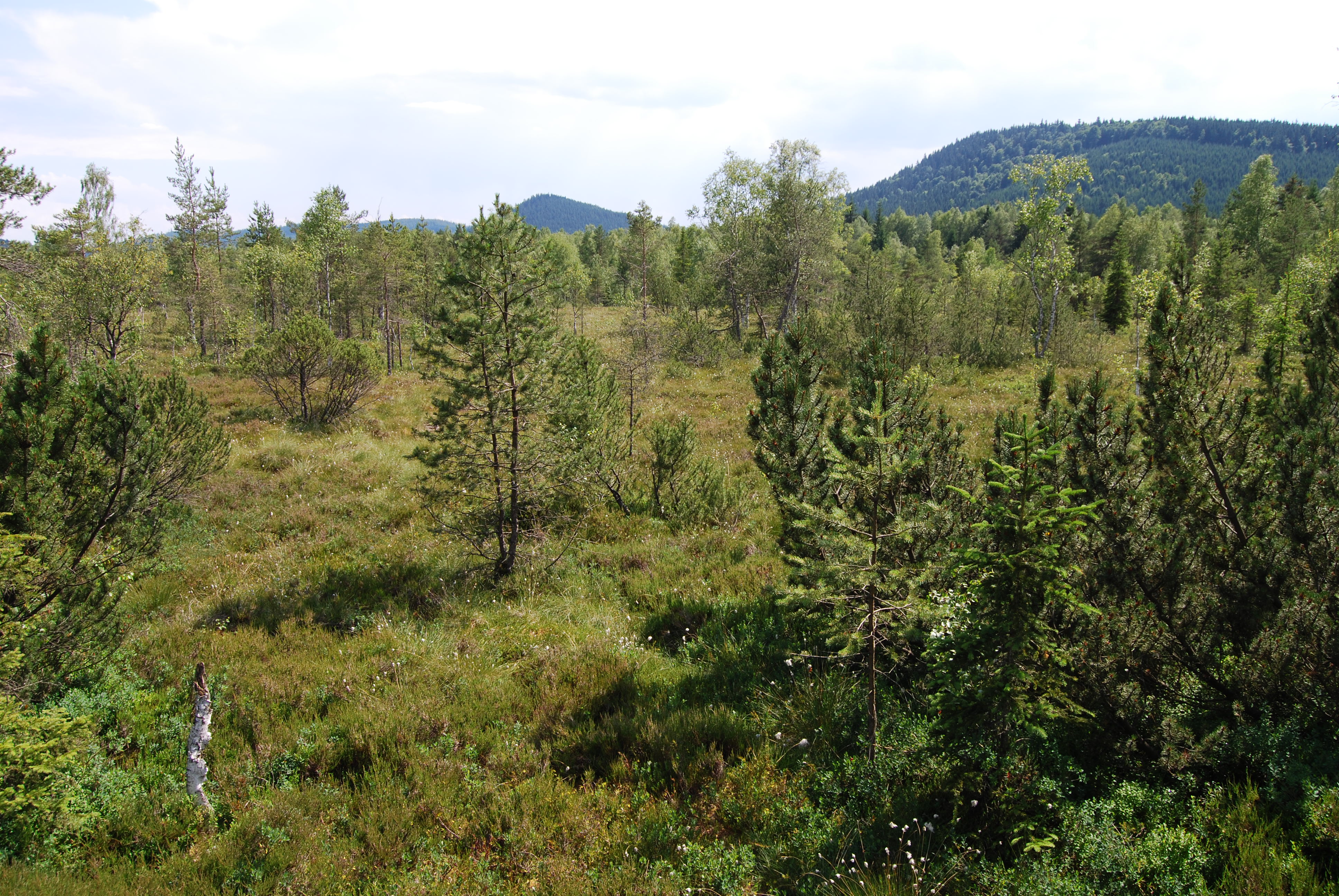 Chalupská slať je rašeliniště v katastrálním území Svinná Lada, zhruba 1 km severně od Borových Lad. Česká republika. - Google Maps - Google Earth